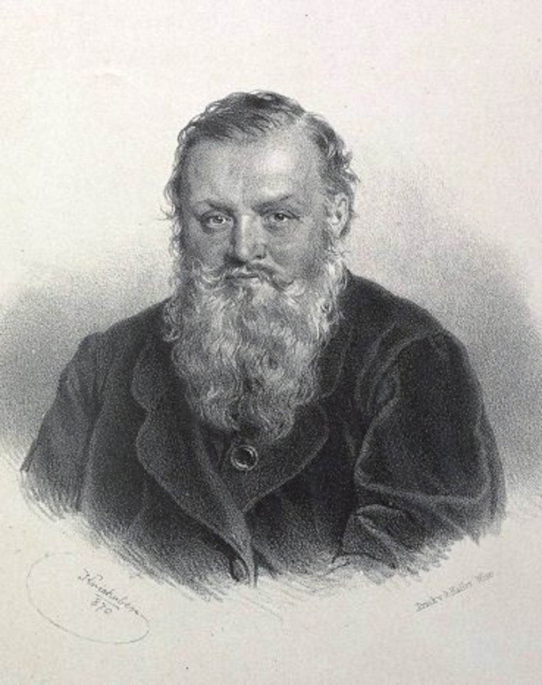 Altersbildnis des Ferdinand Freiherr Kotz von Dobrz Hlawniowitz (1821—1882), aus dem Geschlecht der „Kotz Ritter v. Dobrsch“ (Kotz von Dobrz; Kocové z Dobrše); Reichsratsabgeordneter für Böhmen